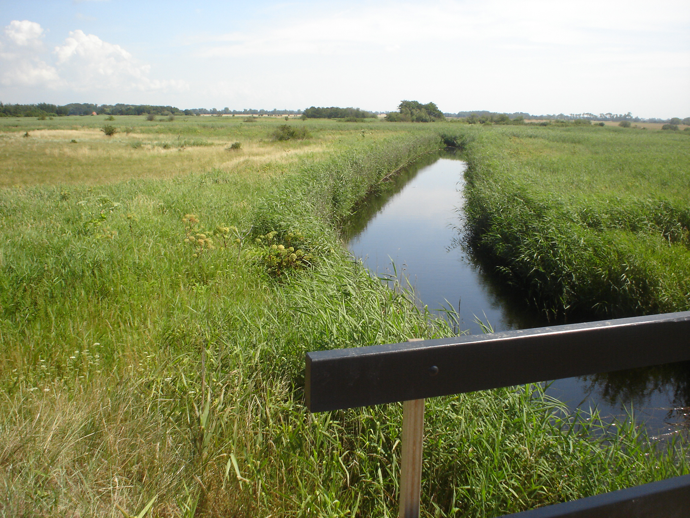 Udkøbskanalen ved Dragsminde på sydkysten af Lolland. Landskabet viser Rødby fjord som den ser ud nu. Landskabet var tidligere indsejlingen til Rødby.